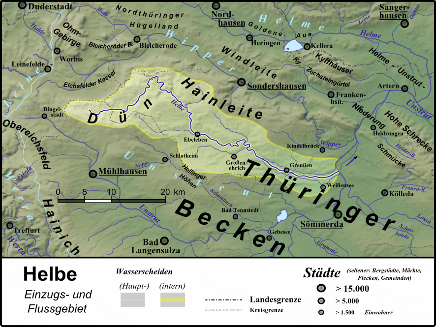 Einzugs- und Flussgebietskarte des Unstrut-Nebenflusses Helbe.